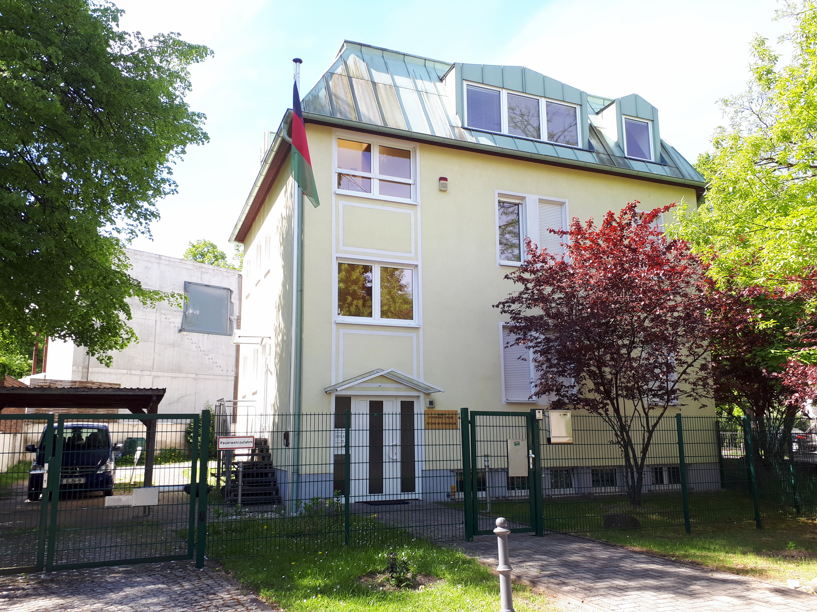 Wilmersdorf Westfälische Straße 85 Botschaft der Republik Malawi